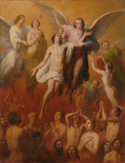 La obra representa a las Ánimas o almas de los condenados al Purgatorio expiando sus pecados en dicho lugar.